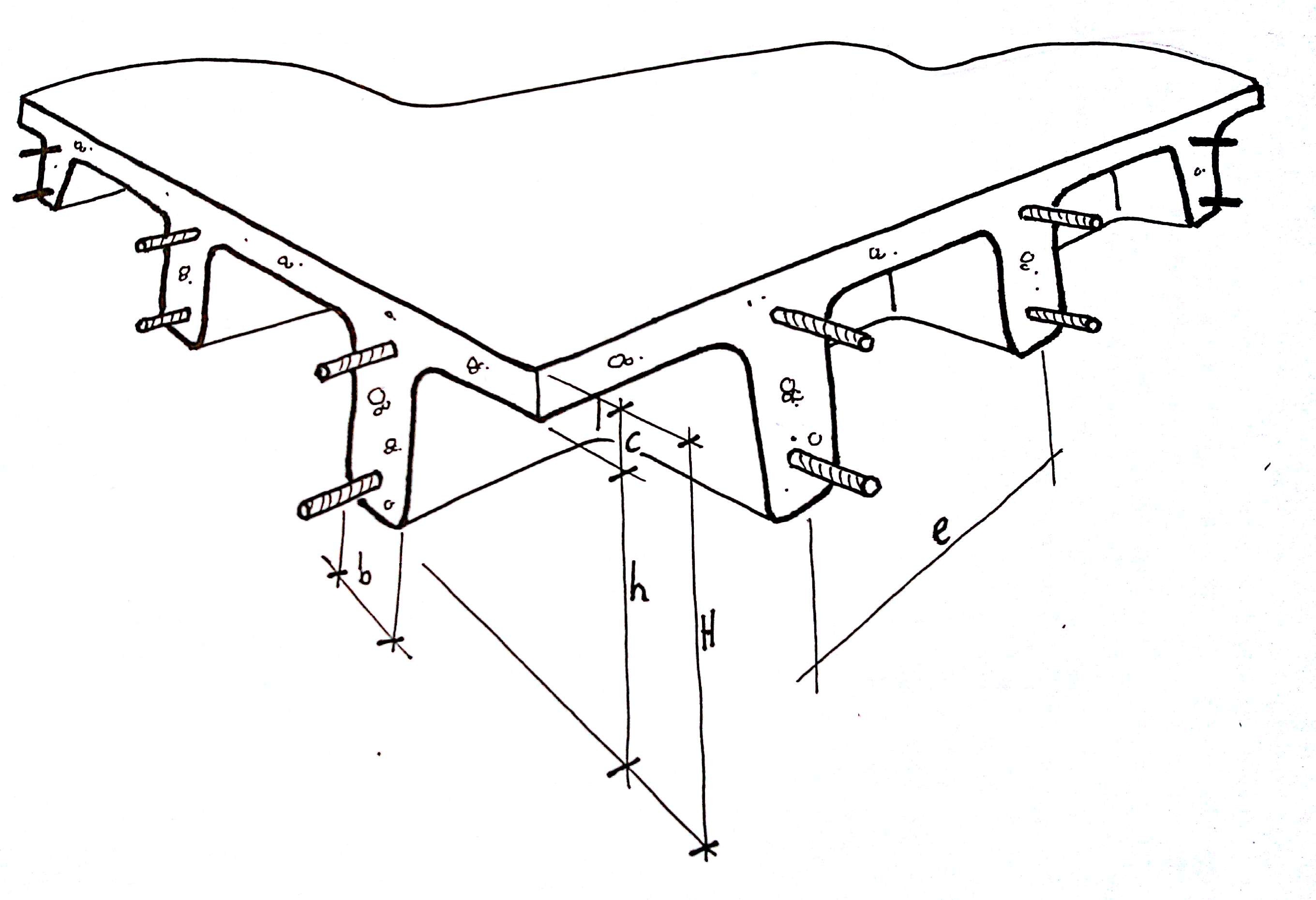 Perspectiva de forjado reticular